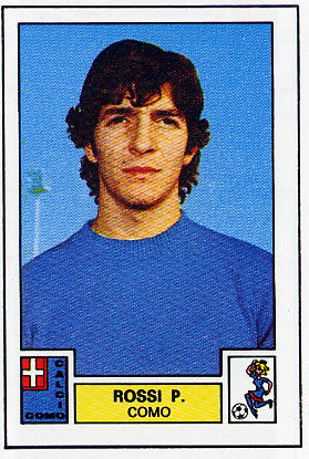 Paolo Rossi che indossa la maglia del Como